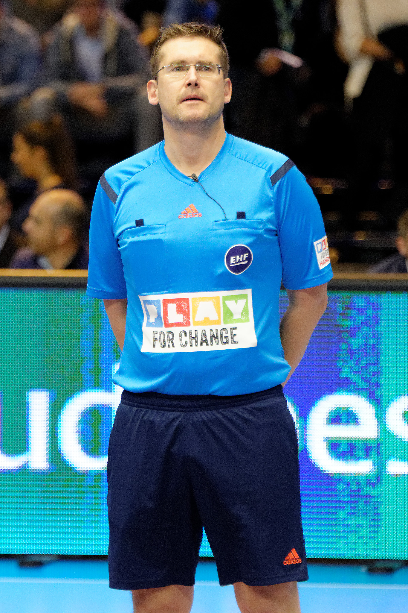 Rencontre de phase de groupe de la ligue des champions 2015-16 entre le PSG et le RK Zagreb. A la Halle Carpentier (Paris), le 11 ocotbre 2015.